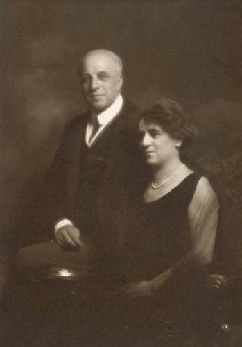 Ettore Modigliani con la moglie